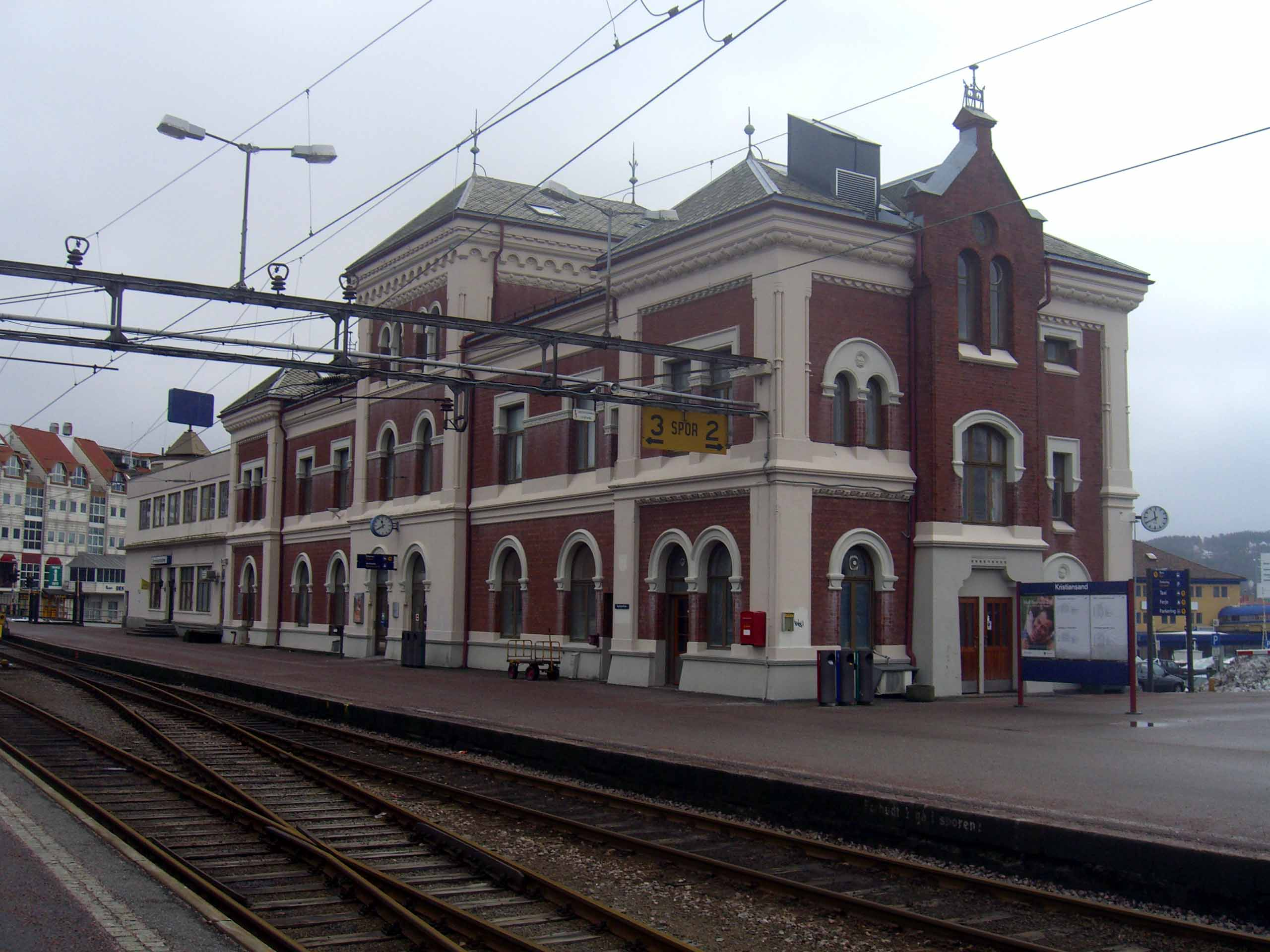 Kristiansand Station on Sørlandsbanen, in Kristiansand, Norway